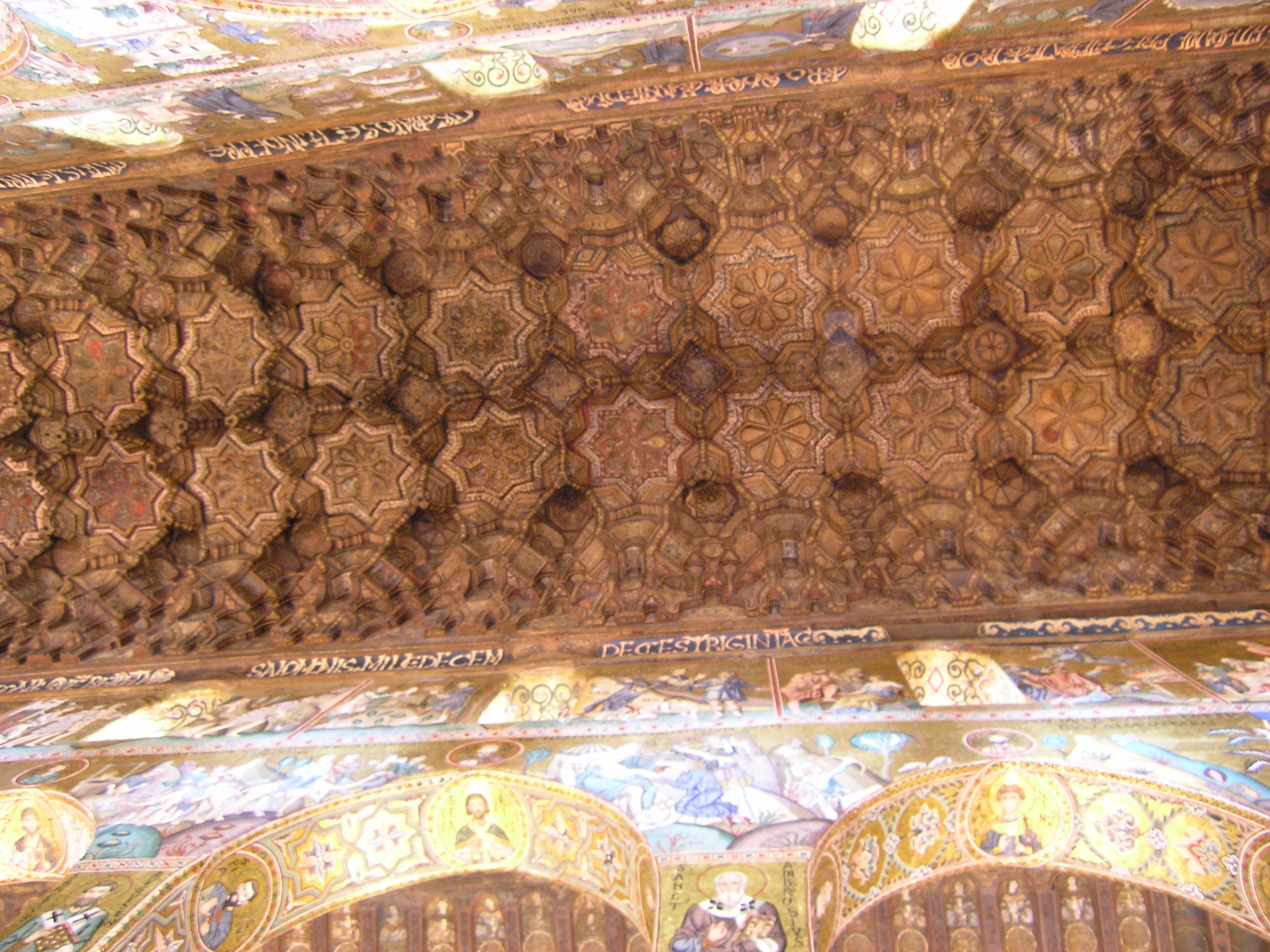 Sicilianu: Palazzu Riali - Cappella Palatina